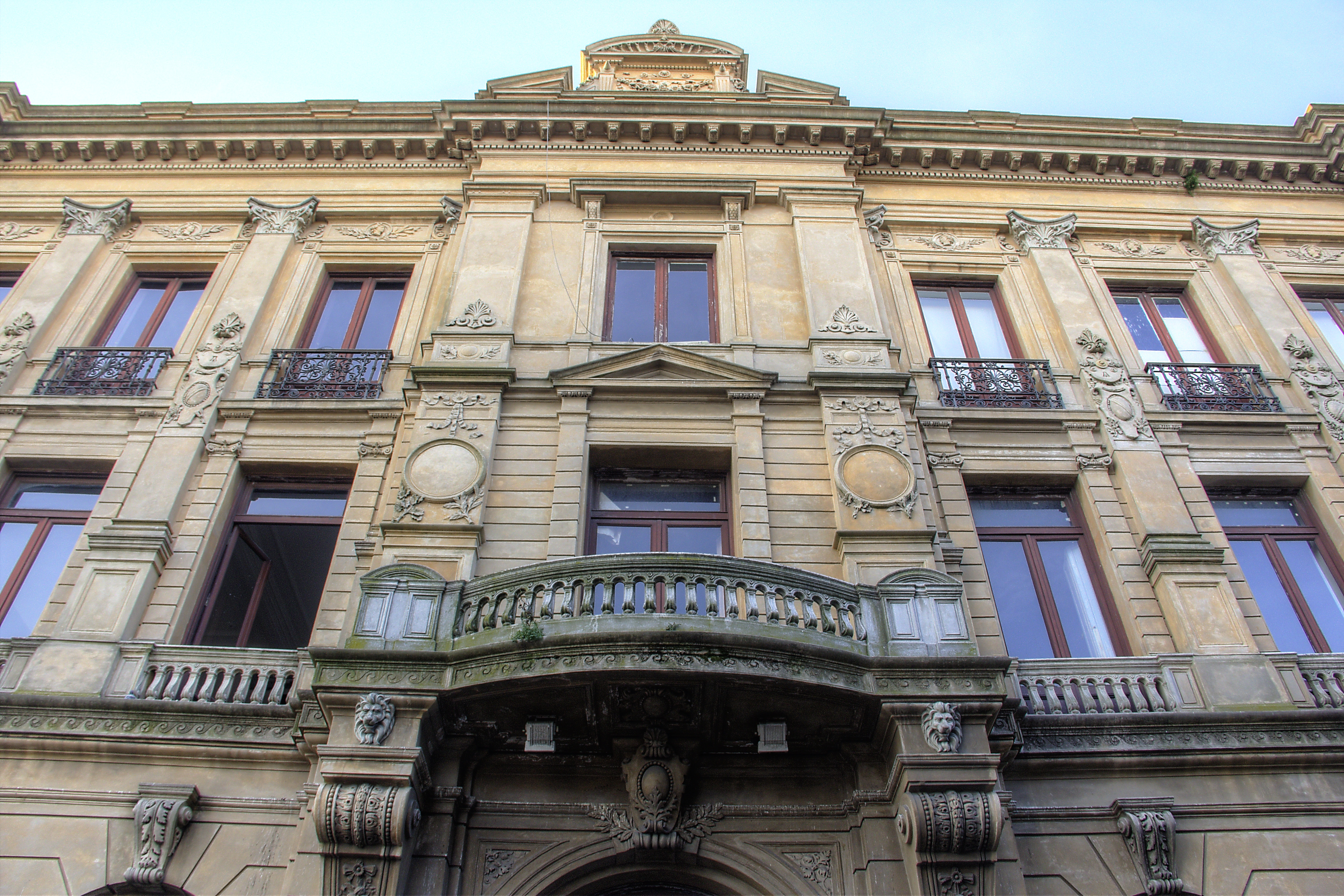 Antiguo Establecimiento Médico e Hidro - Térmico Terápico - Ex Sede del Ministerio de Defensa. Ubicada en el departamento de Montevideo